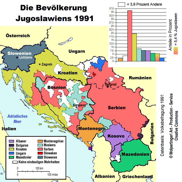 Die Bevölkerung Jugoslawiens de:1991 Daten von Urheber: wolpertinger Quellenangabe und Beleg an diese Mailadresse erbeten. Siehe auch: Karte: Serbischer Vorschlag zur Verwaltungsgliederung des Kosovo (Mai 2001) Politische Karte der Entität Föderation Bosnien und Herzegowina und der Republika Srpska im Staat Bosnien und Herzegowina